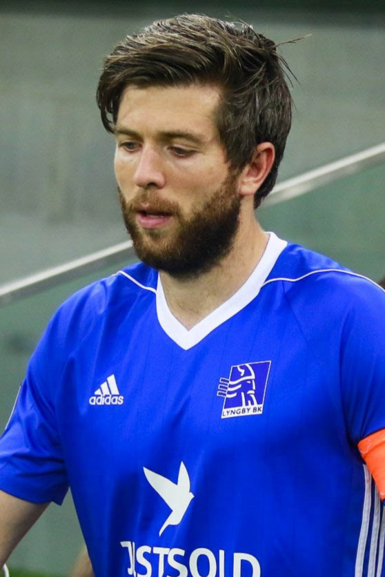 «Краснодар» - «Люнгбю»